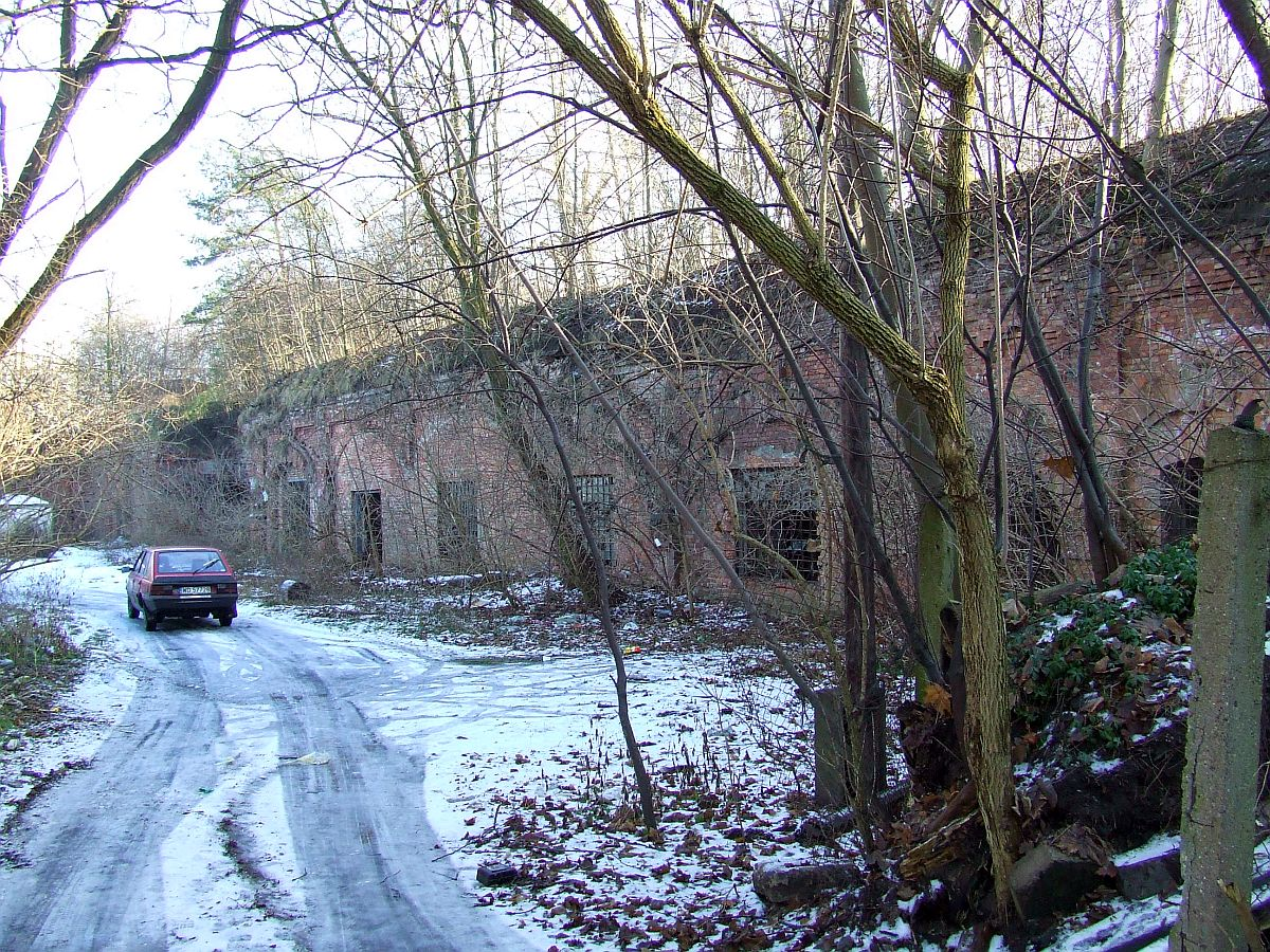 Fort Tsche Twierdzy Warszawa, Warsaw